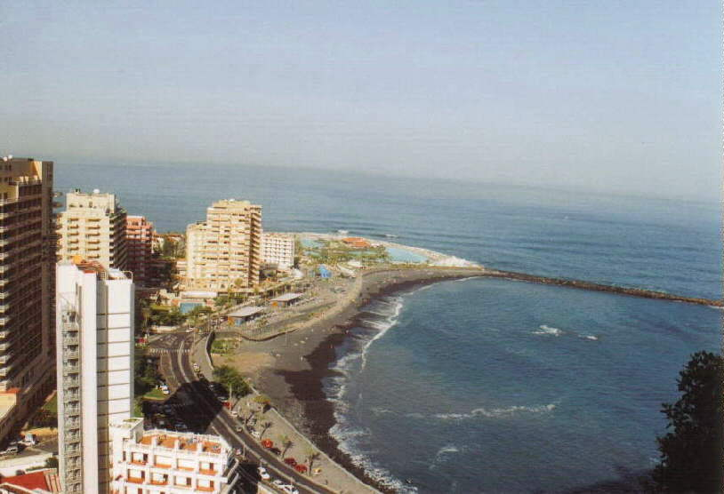 Playa de Martiánez, Puerto de la Cruz, Tenerife, Canarias, España, 2003